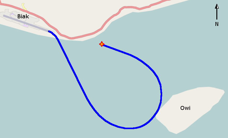 Gevolgde route en locatie van de crash van KLM-vlucht 844.Unknown